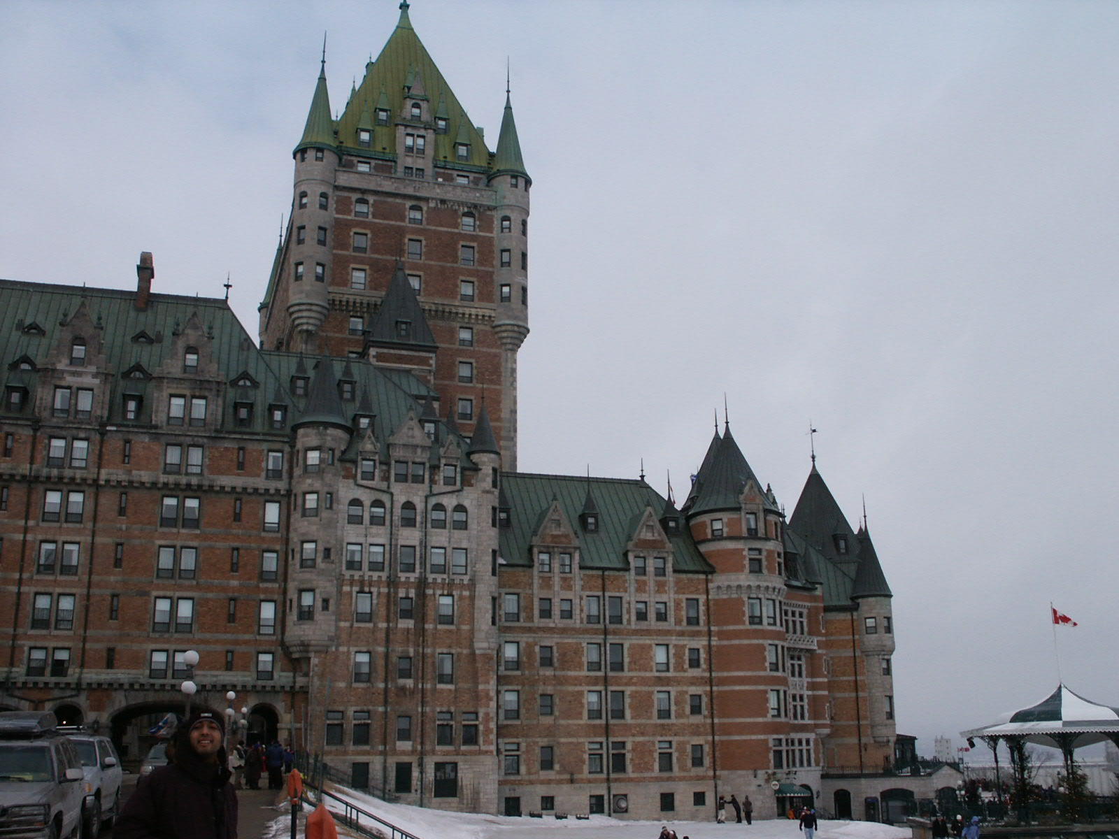 Quebec castle, Canada